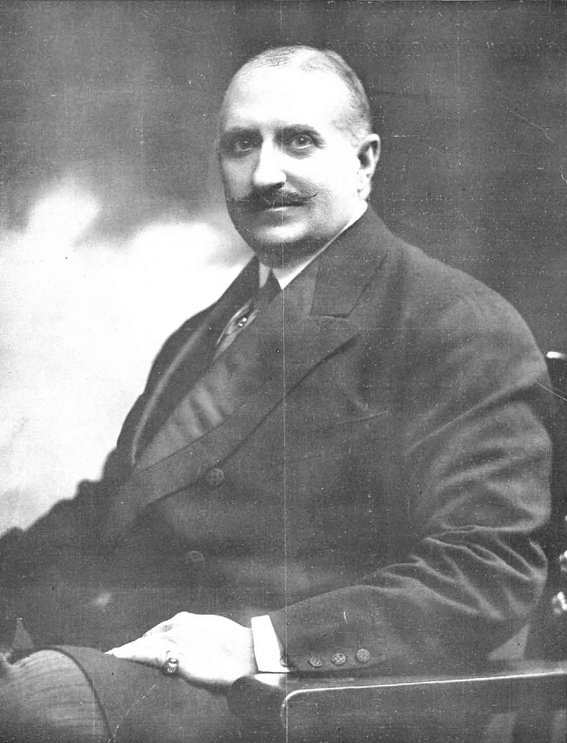 José Prado Palacio.